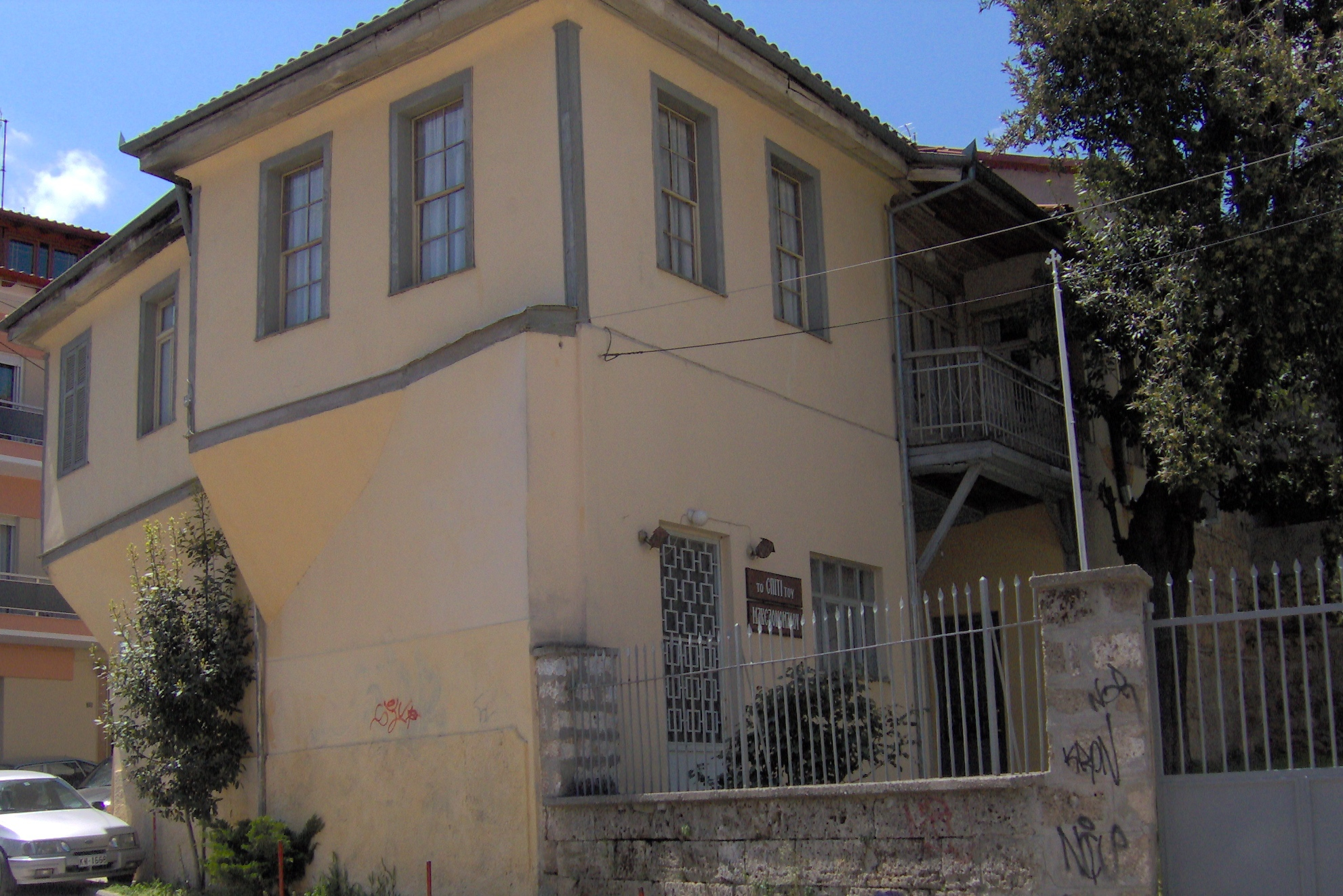 Το μουσείο του Μακεδονικού Αγώνα στην Νάουσα (τώρα ανενεργό) που στεγάζεται στο Επισκοπείο της πόλης, οικία του 19ου αι.